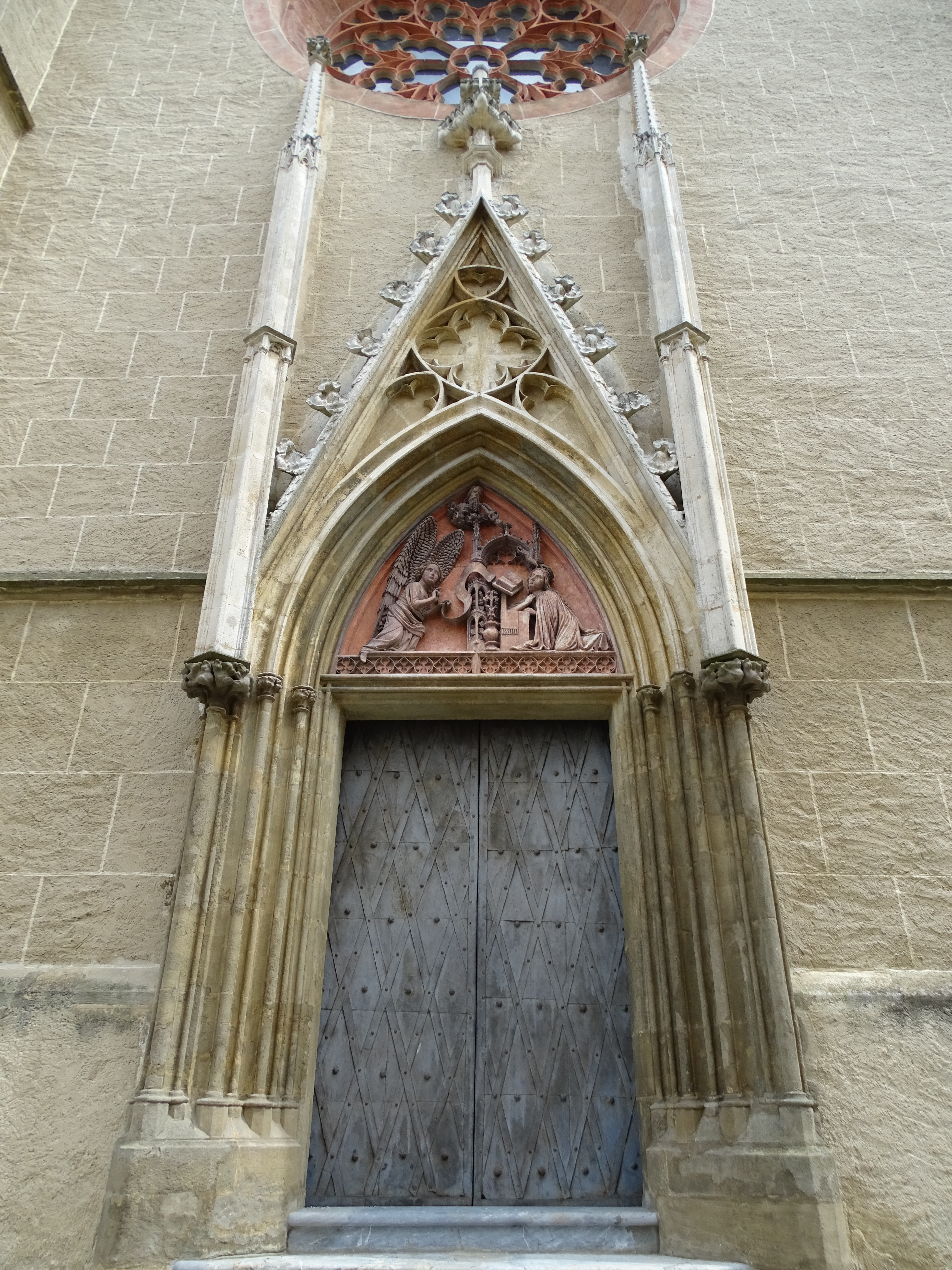 Das Westportal der Wallfahrtskirche Maria Straßengel